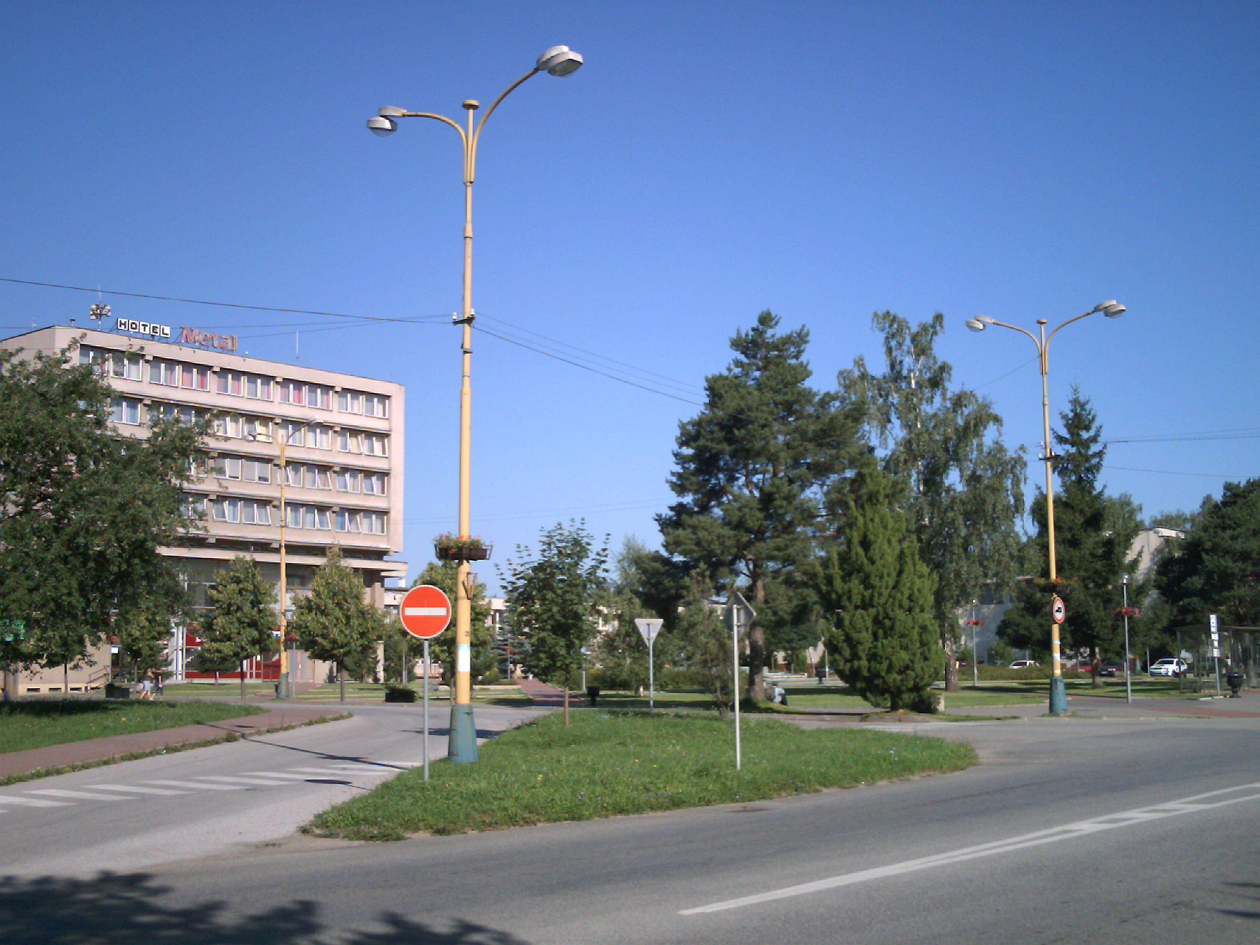 Slovakia, Kosice - Saca centre